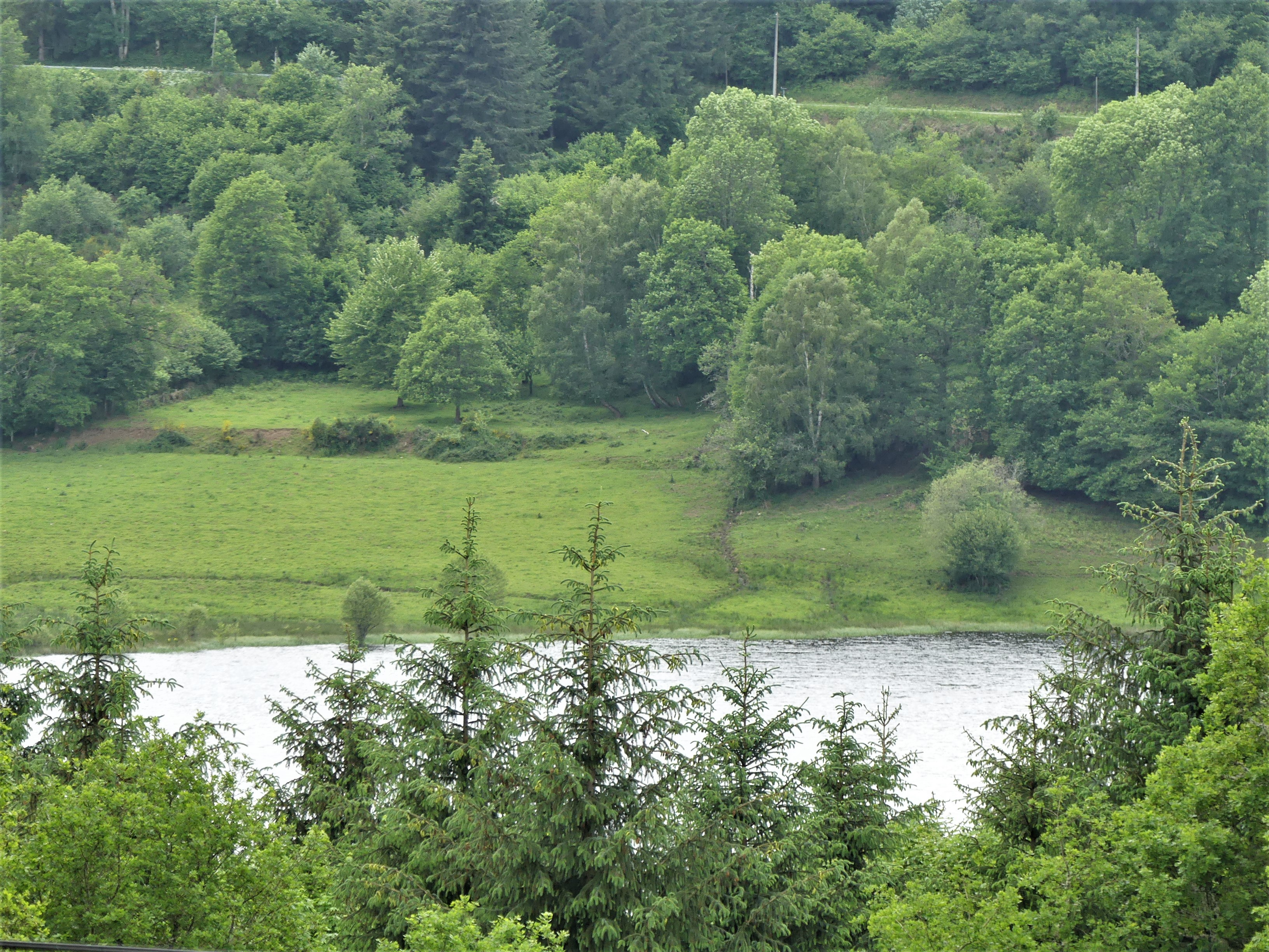 La retenue du barrage de la Rozeille à Beissat, Creuse, France.